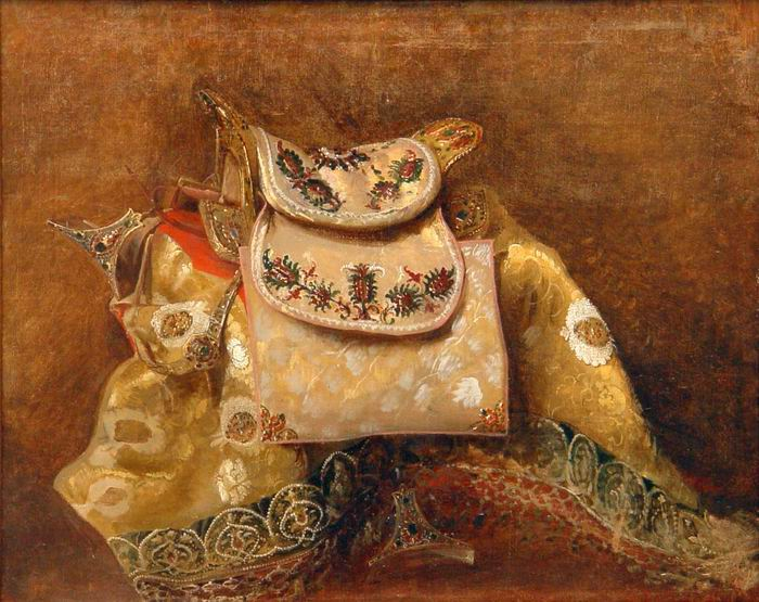 Литовченко А.Д. Седло, украшенное драгоценностями 1875 (эскиз к картине "Иван Грозный показывает сокровища английскому послу Горсею")